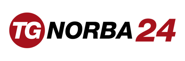 logo tg norba 24